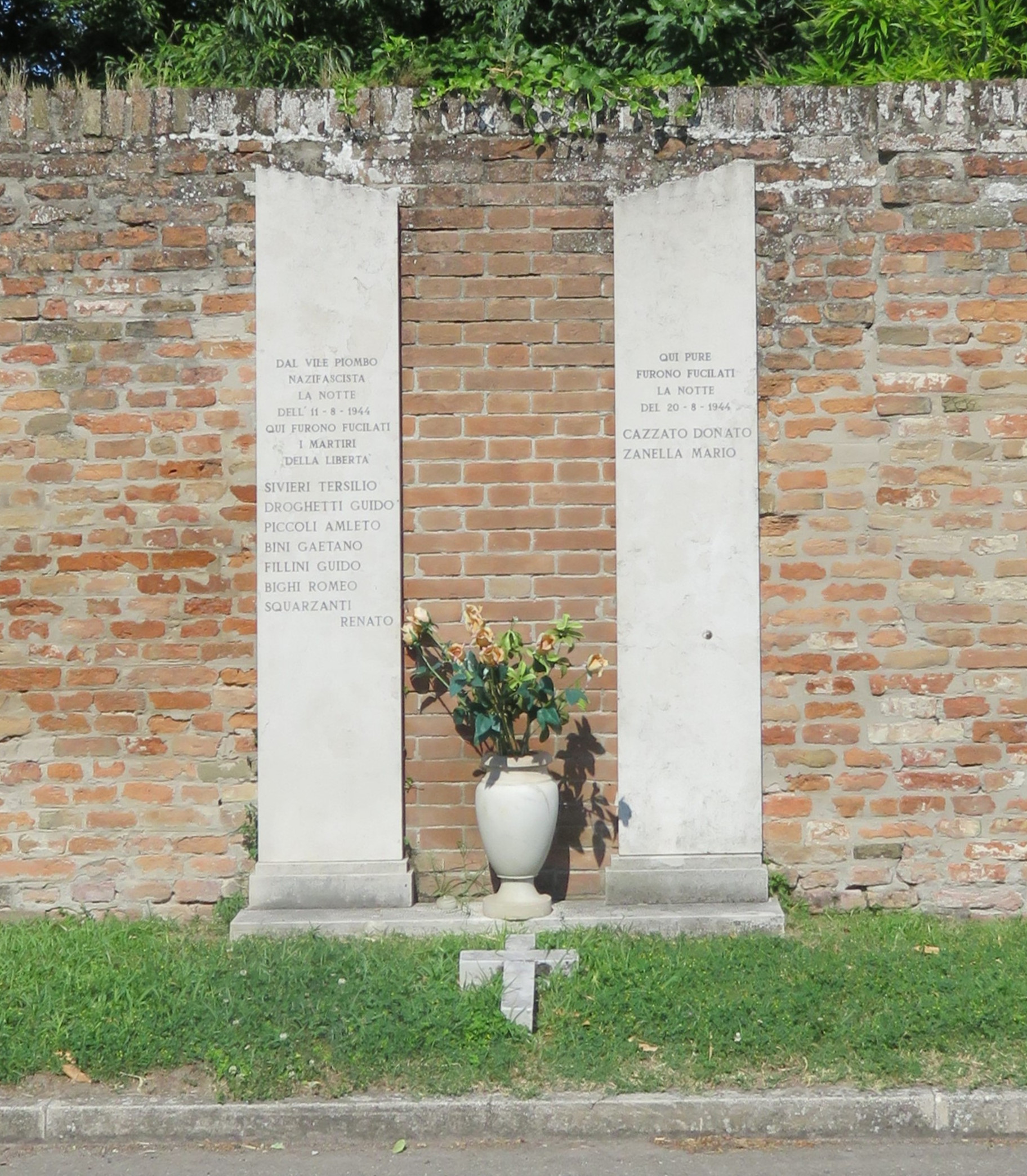 Monumento che ricorda la notte tra l’11 e il 12 agosto del 1944, quando nei pressi della Certosa un plotone di esecuzione italiano fucilò 7 persone. Di fianco il monumento che ricorda la fucilazione di altre 2 persone, la notte del 20 agosto.